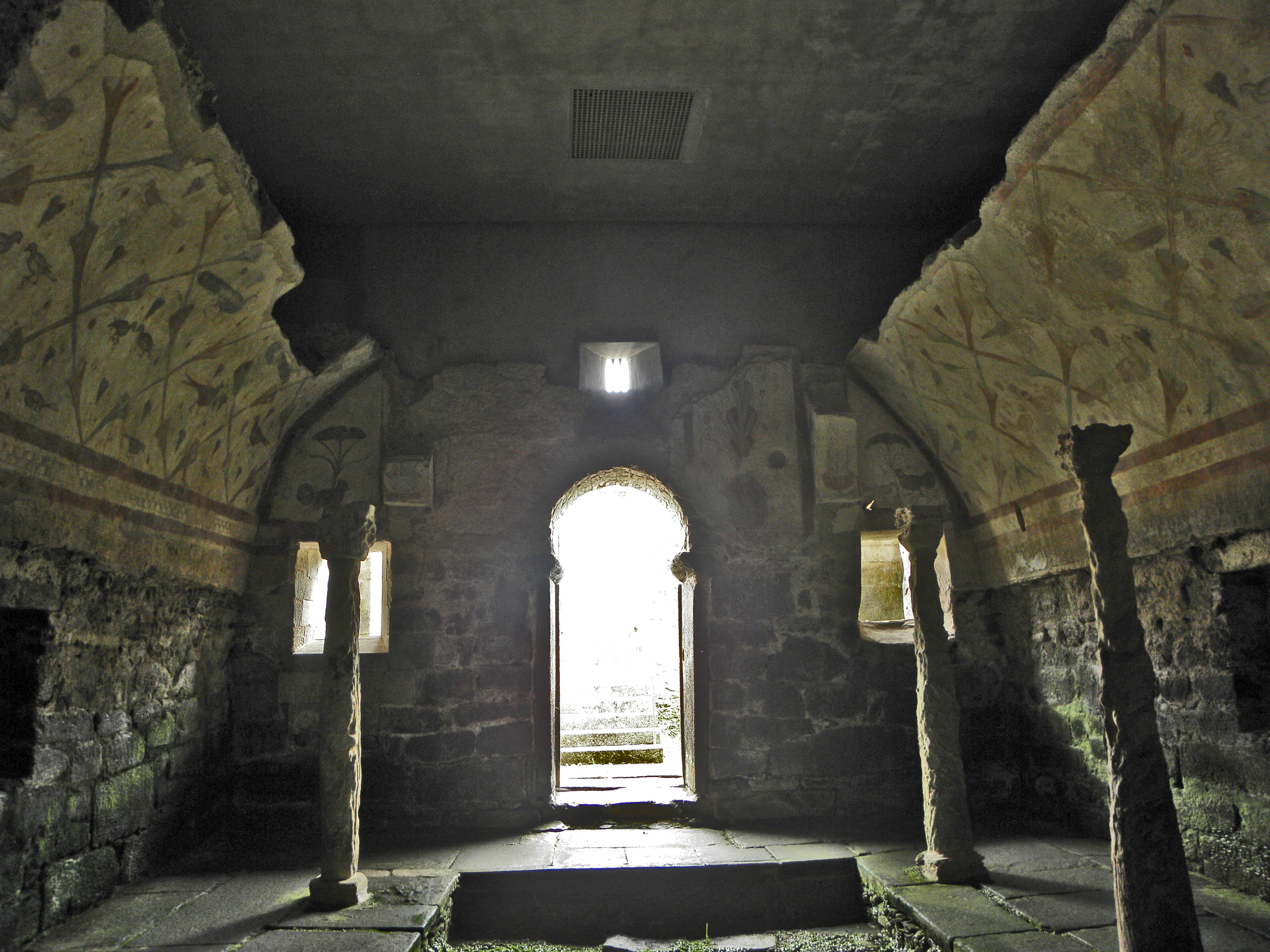 Fase/Estilo: Visigodo/Romano-Suévico Época: Siglos IV-V Situación: Sta. Eulalia de Bóveda (Lugo)